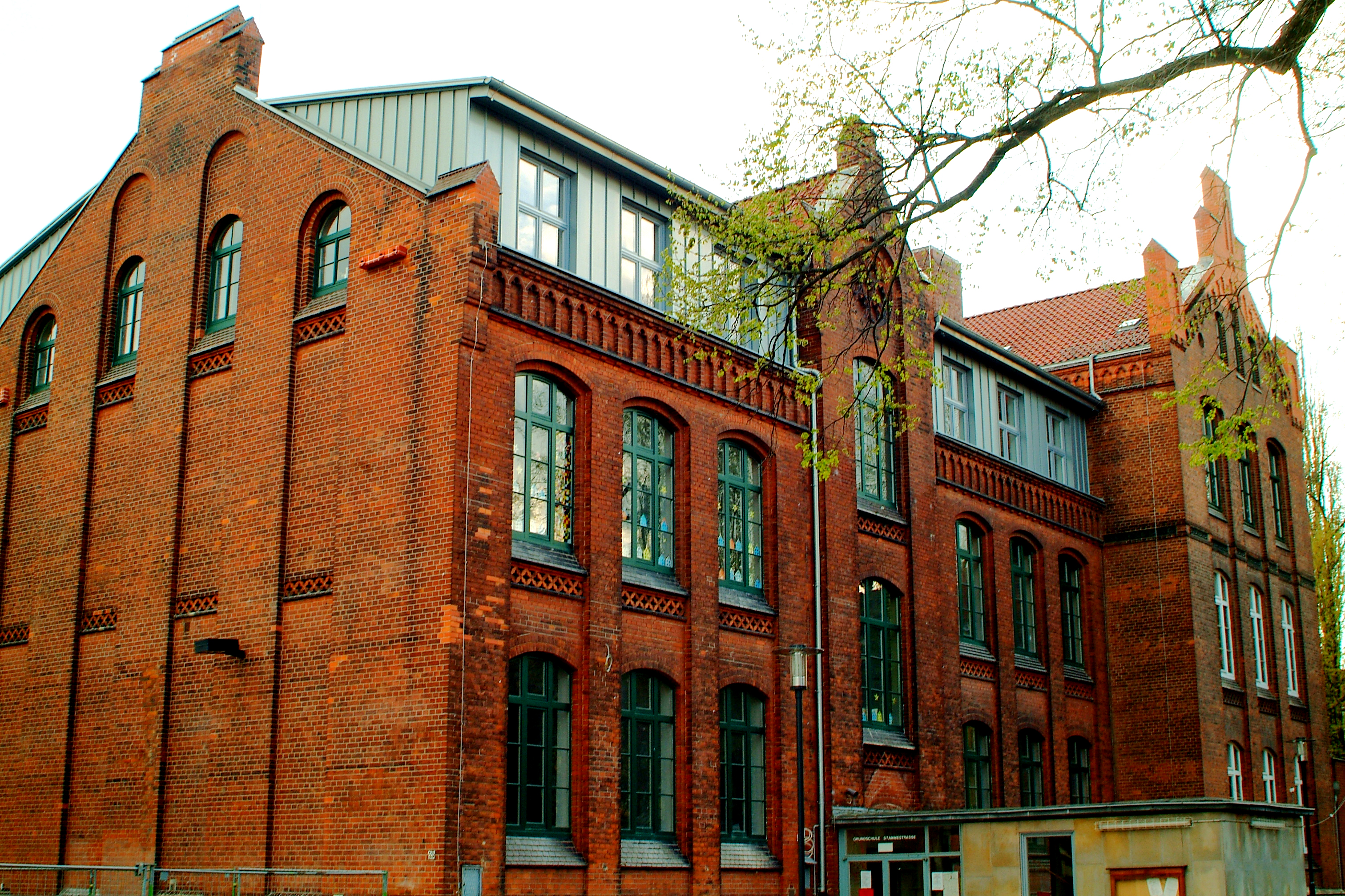 Sie haben ein besseres Bild? Sogar ein historisches Dokument als Bild(ungsförderung)? Zeigen Sie' s uns. Stiften Sie es, allen Menschen.